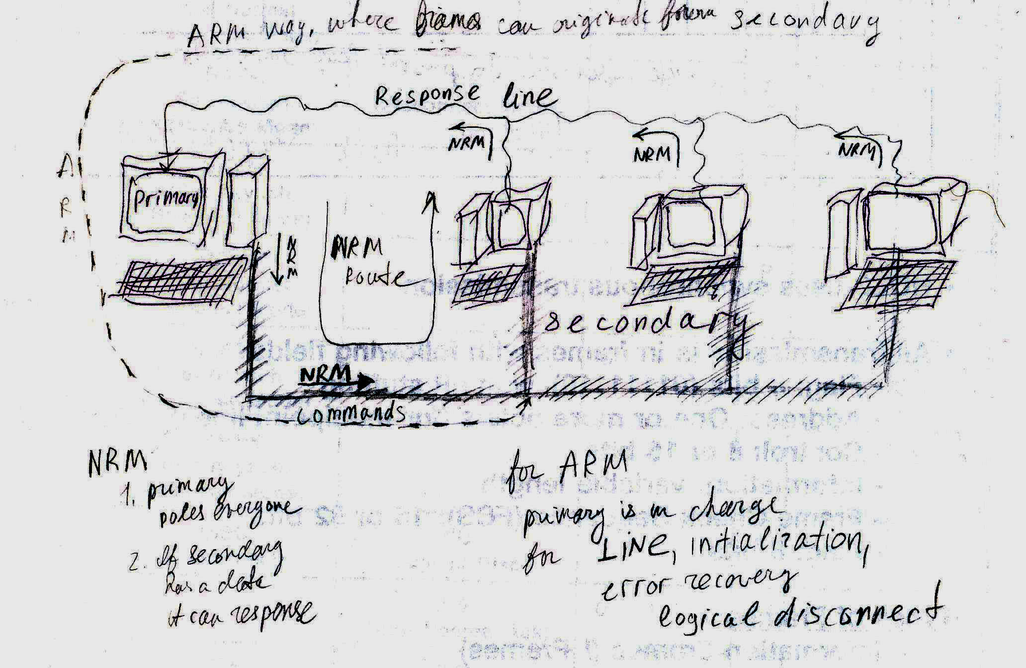 HDLC Data Transfer modes, illustraded